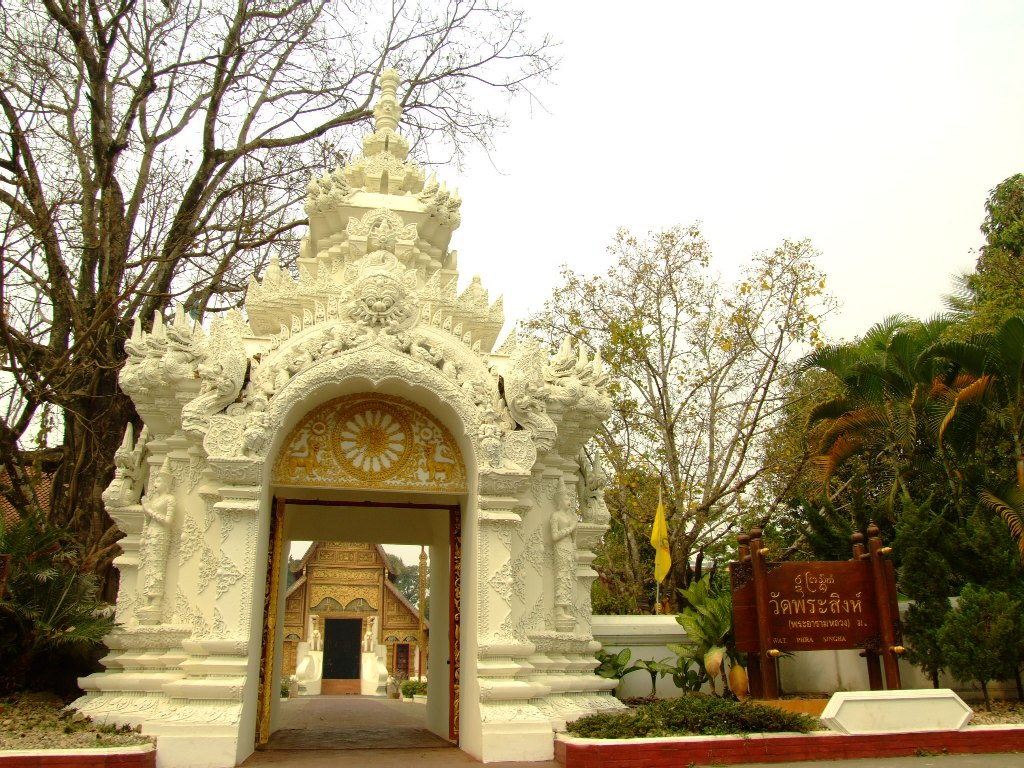 ซุ้มประตูโขง วัดพระสิงห์ เชียงราย สัญญาอนุญาต The present photo is taken or owned by Thanyakij. The camera used was: Fujifilm Finepix S9500.